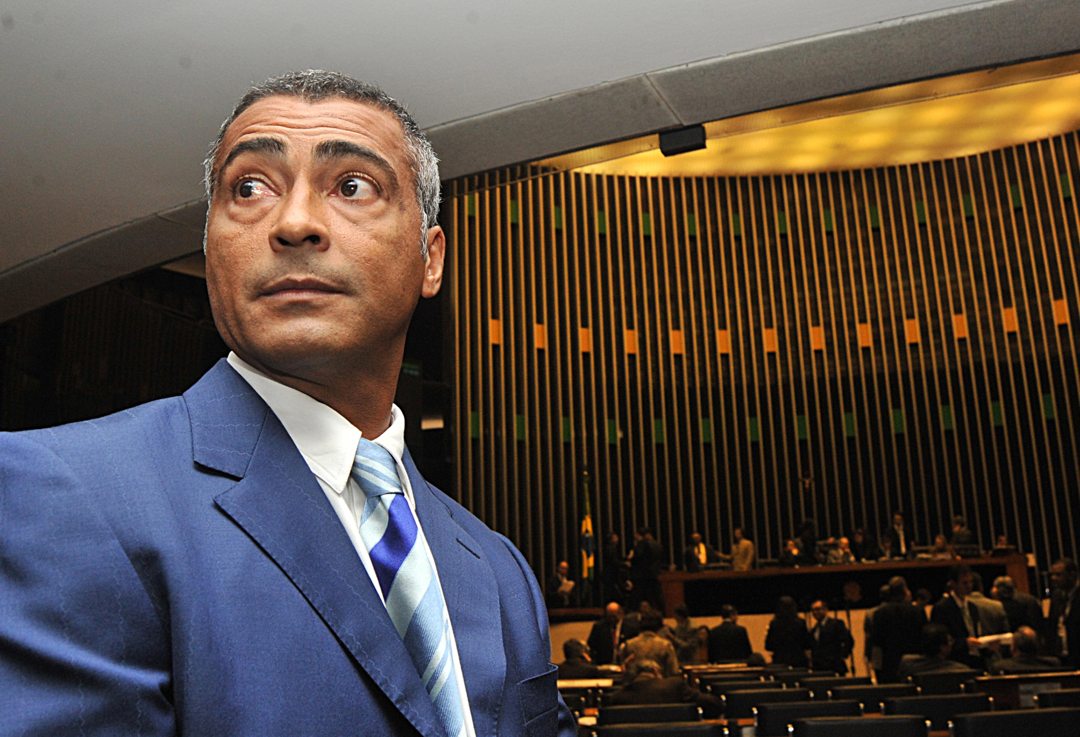 Brasília - O ex-jogador de futebol Romário visita a Câmara dos Deputados (José Cruz/ABr)